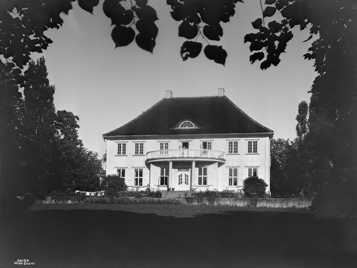 Prinsessealléen 20 fotografert 1930